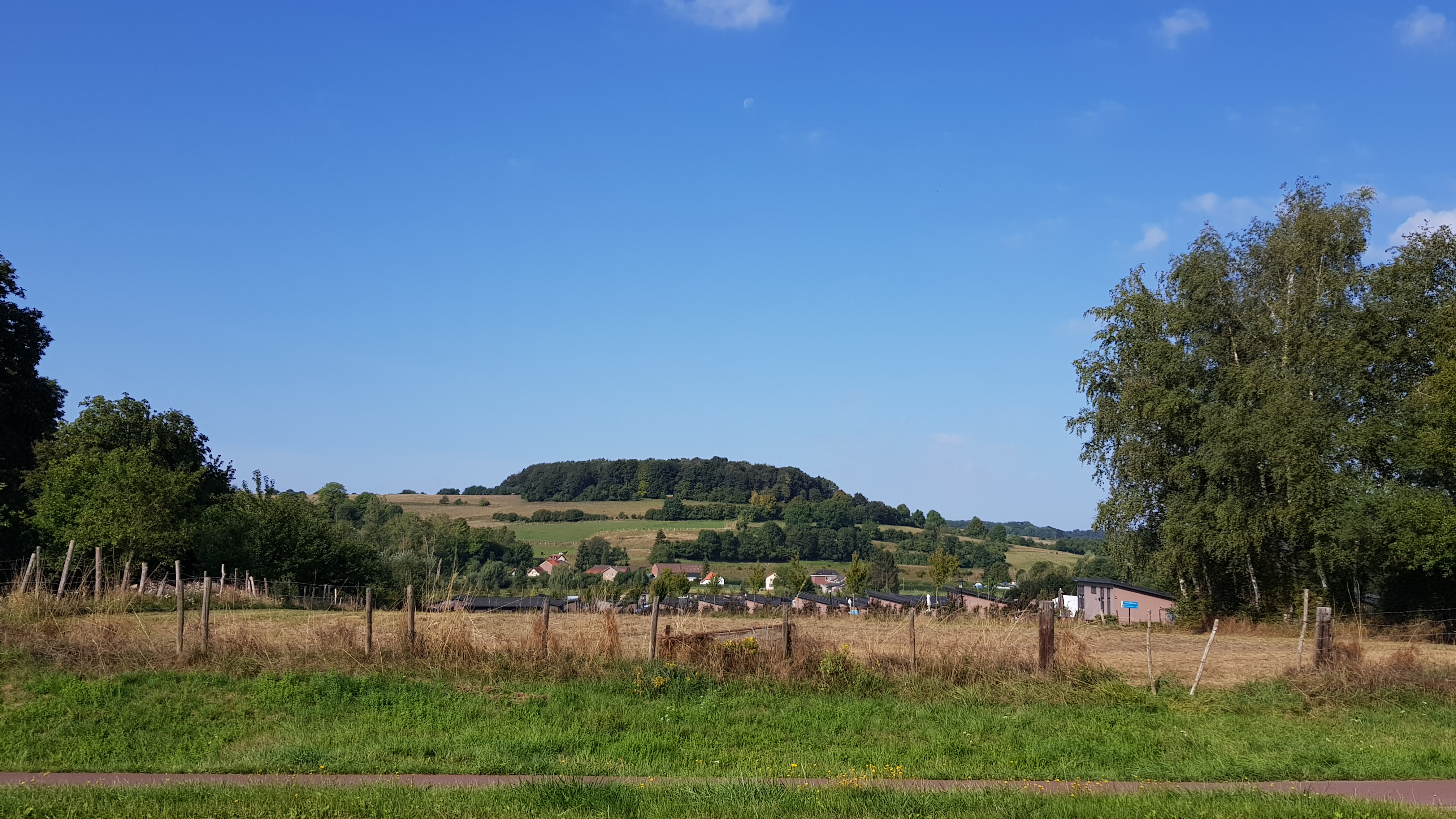 Sousberg gezien vanuit het oosten, Schin op Geul, Nederland